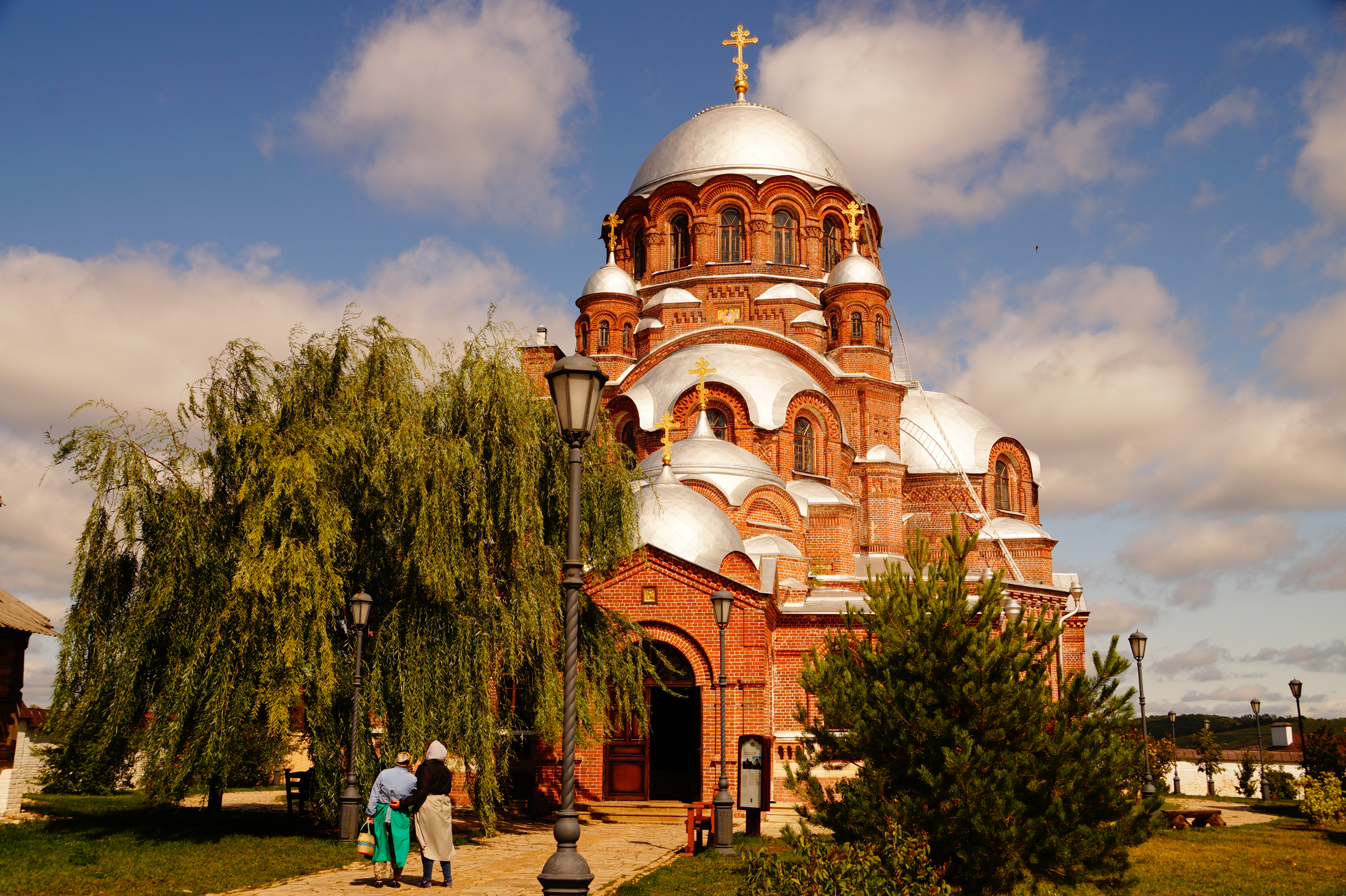 Собор Всех Скорбящих Радость: Свияжск, Зеленодольский район, Татарстан